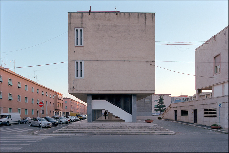 08/05/2009 : Guidonia (RM), piazza Matteotti (già piazza del Municipio): ex casa del fascio (Giorgio Calza Bini, 1937)